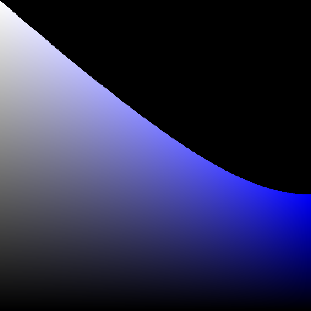 Doorsnede uit een kleurenruimte voor RGB-monitors. Op de assen: intensiteit (vertikaal) en verzadiging (horizontaal). Tint: 240 graden (van 360).